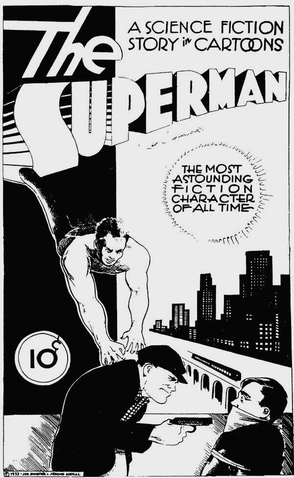 Capa e único material restante da história The Superman, produzida por Jerry Siegel e Joe Shuster em 1933, e precursora do personagem "Superman", criado por ambos.